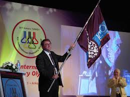 The acutal IChO flag